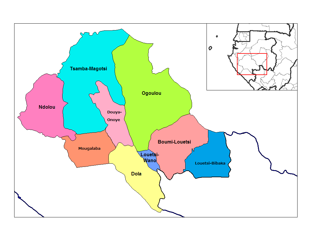 ングニエ州（Ngounié）の県（Departement）の地図。ガボン2013年国勢調査の資料に基づく：[1]